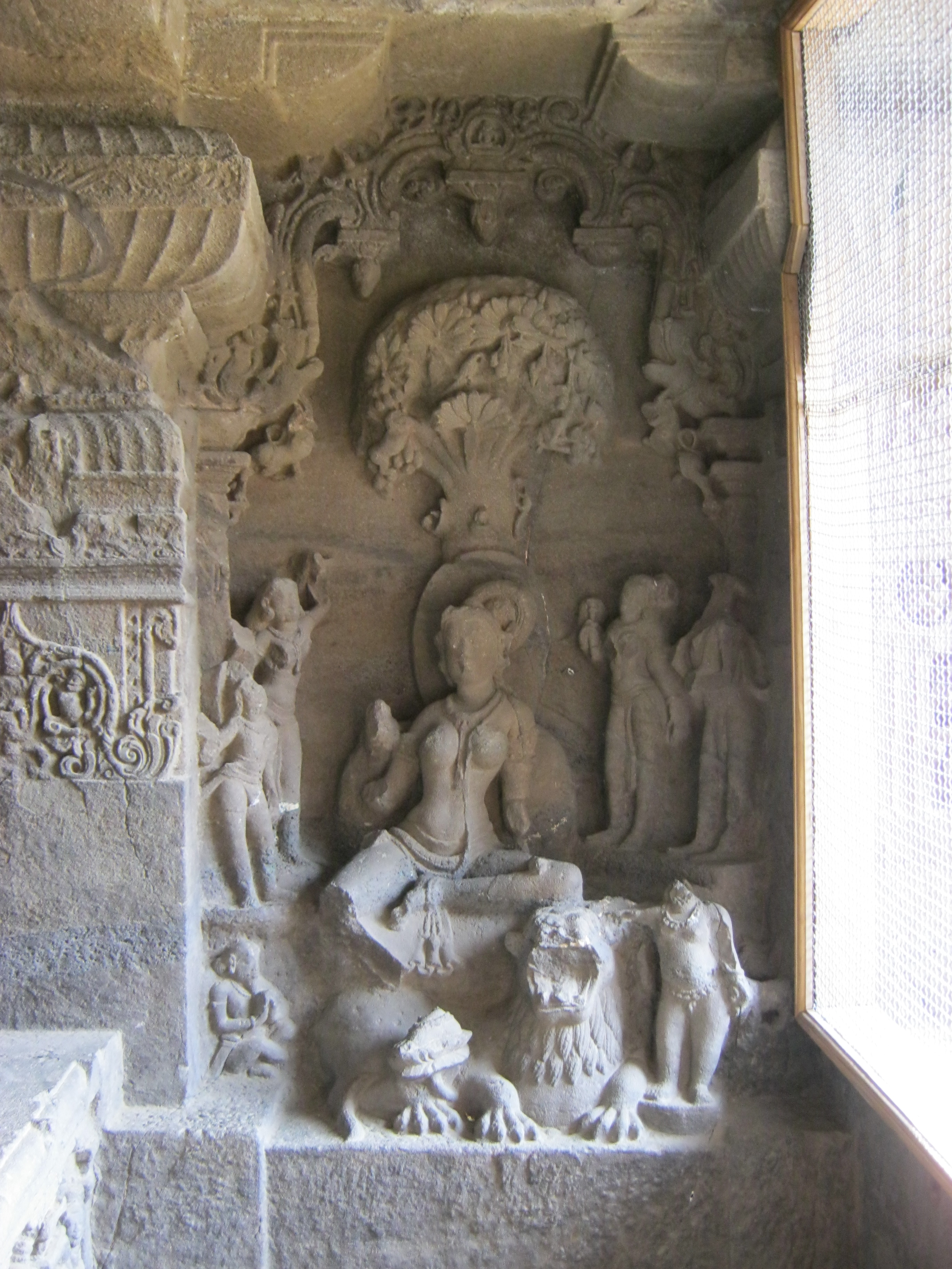 Siva is blessing under a banyan tree. His wife is also believed doing so. 'ஆலமர் செல்வன்' என்பது சங்ககாலத் தொடர். அவன் மனைவியாகிய இவளும் 'ஆலமர் செல்வி' எனக் காட்டப்பட்டுள்ளாள்.